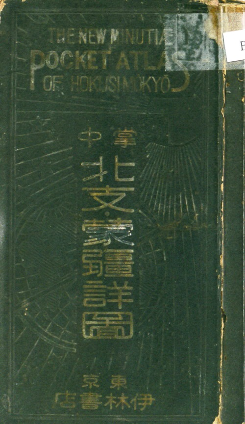 中文（台灣）: 昭和14年: 東洋印刷 / 木崎純一製圖